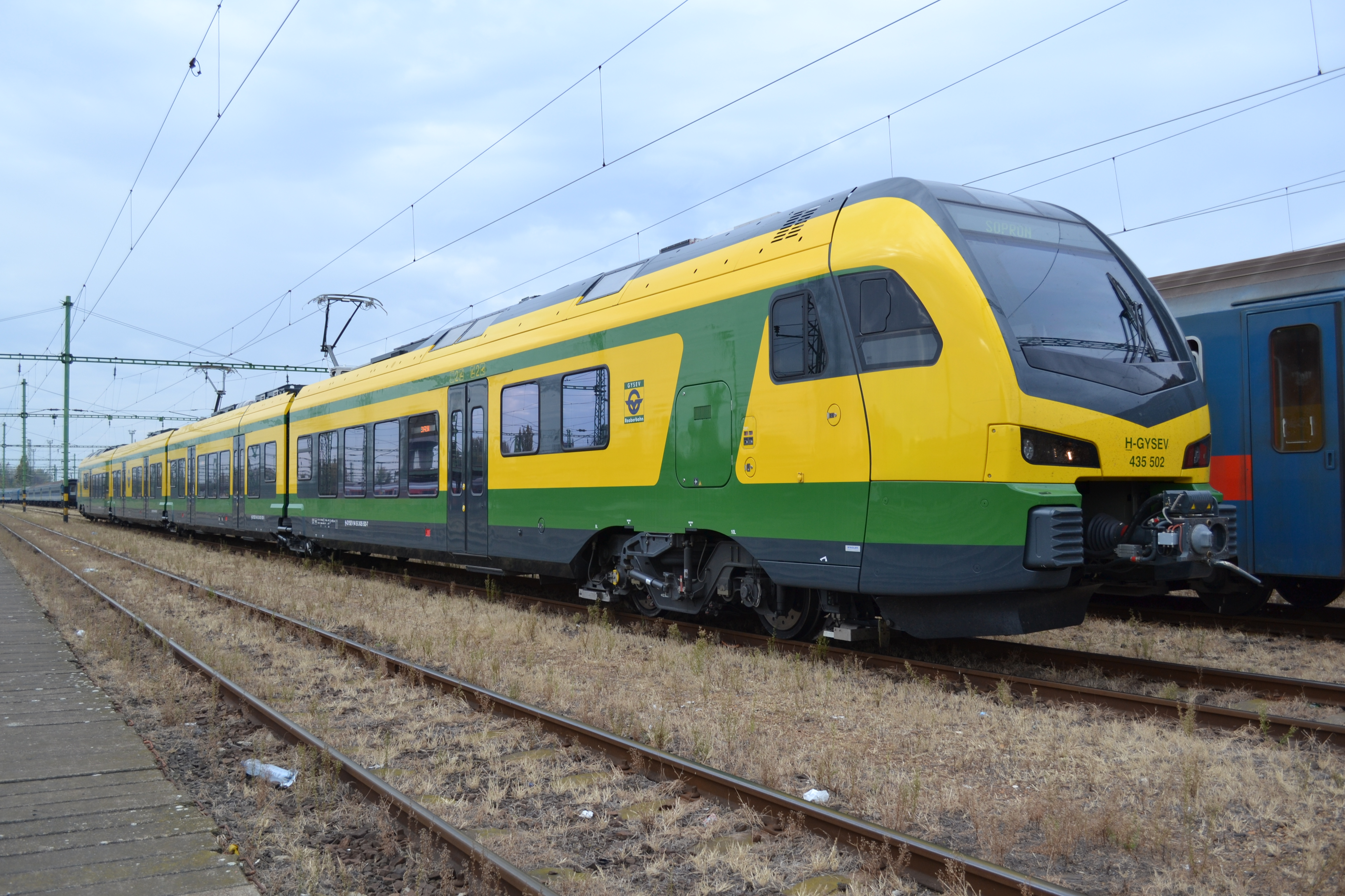 FLIRT 3 Szolnokon a 20. vágányon (ide nem vezet aluljáró)